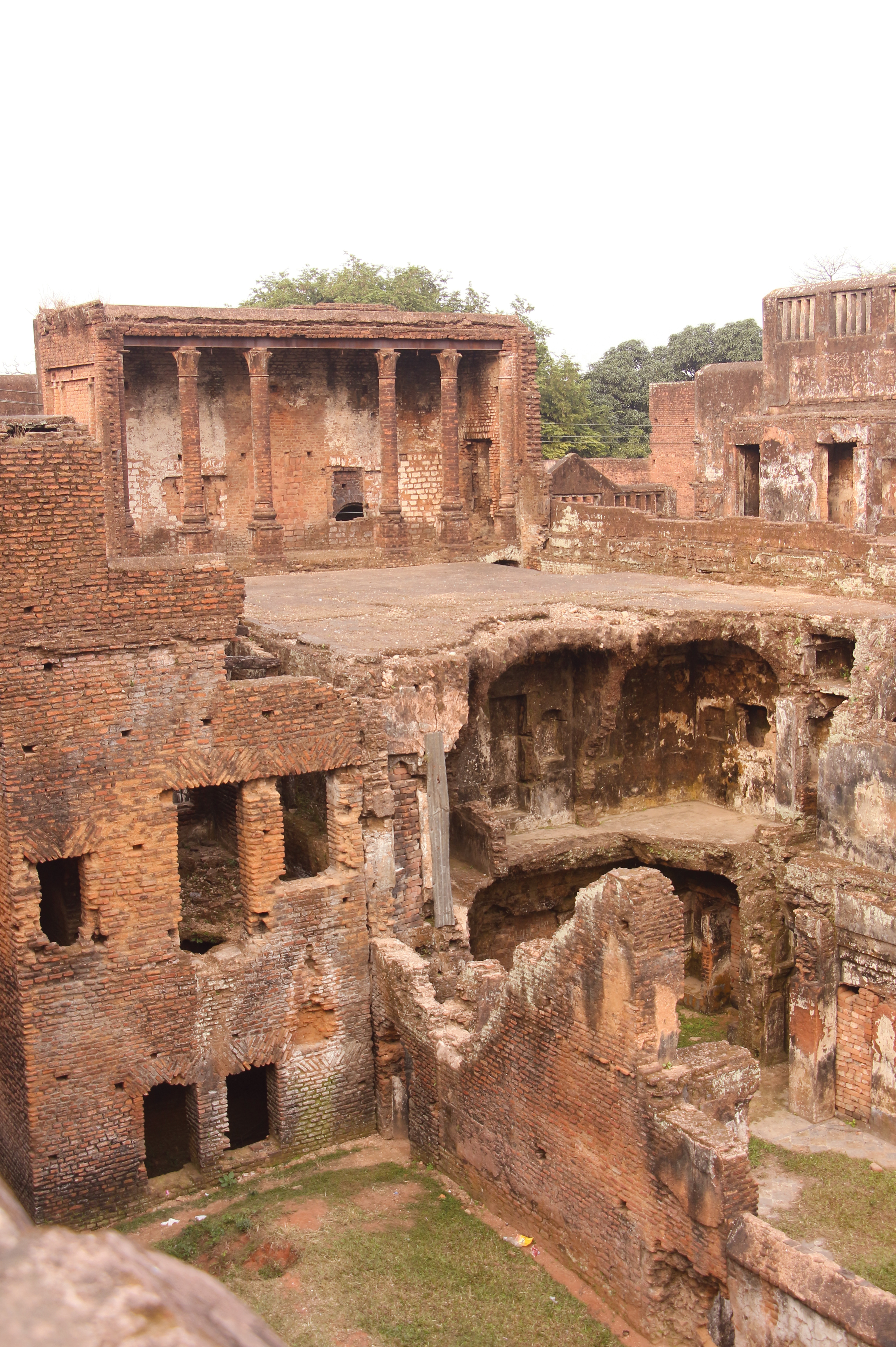 পানাম নগর